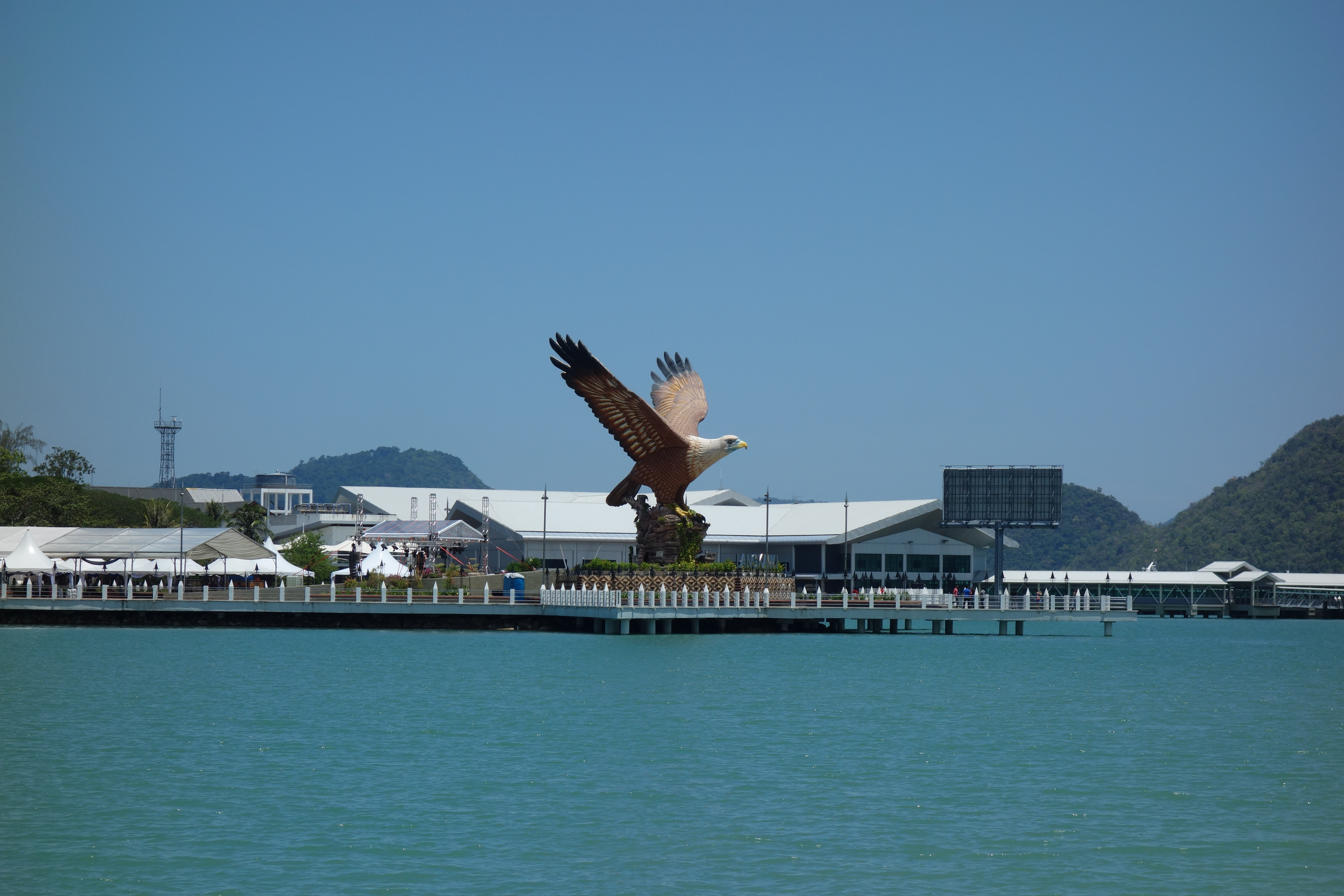 Kuah Town Langkawi Malaysia